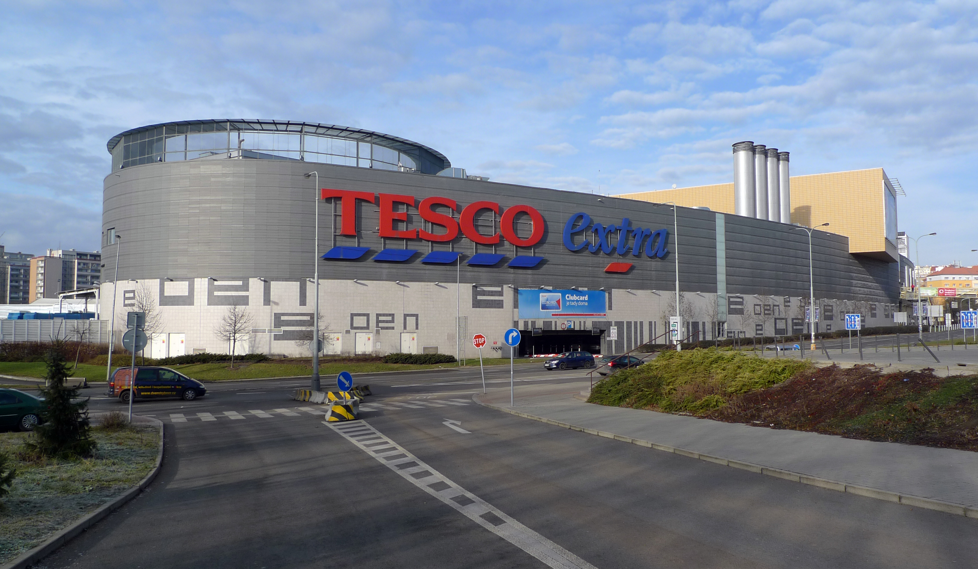 Nákupní centrum Eden od Eden Arény.